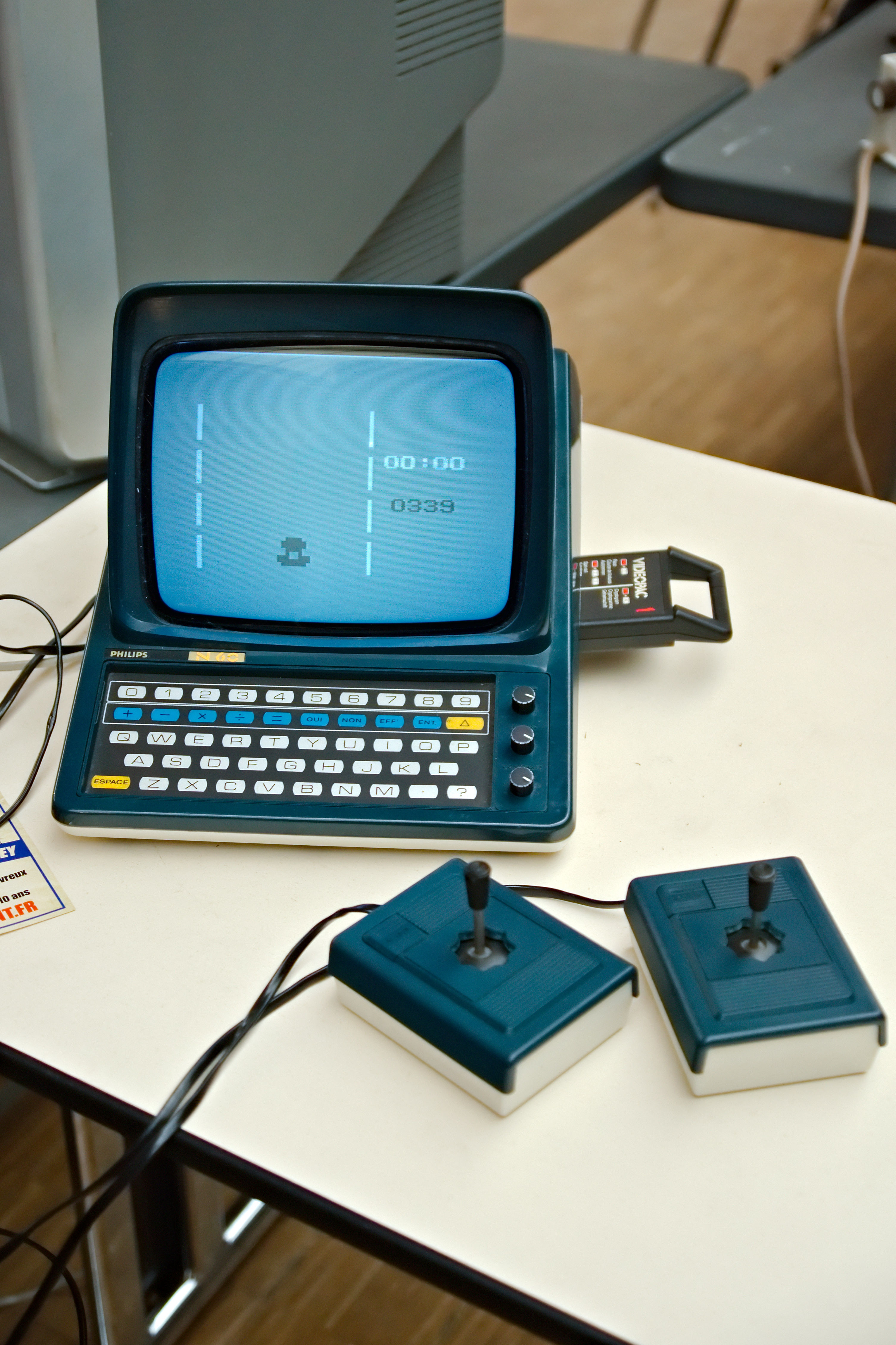 Philips Videopac N60 au RetroGaming Days IV à la Halle des Expositions d’Évreux